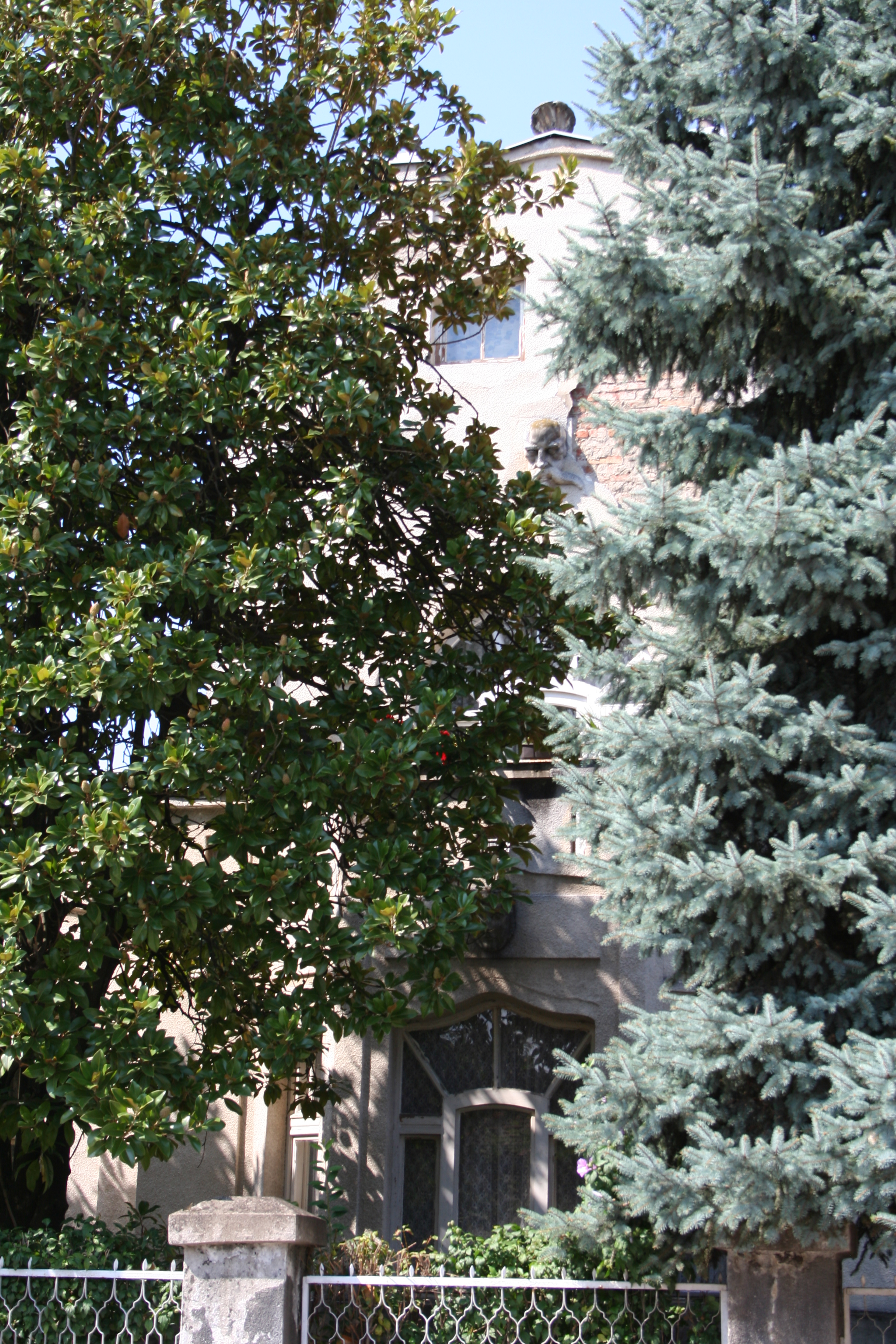 Vila Tucovića, Valjevo